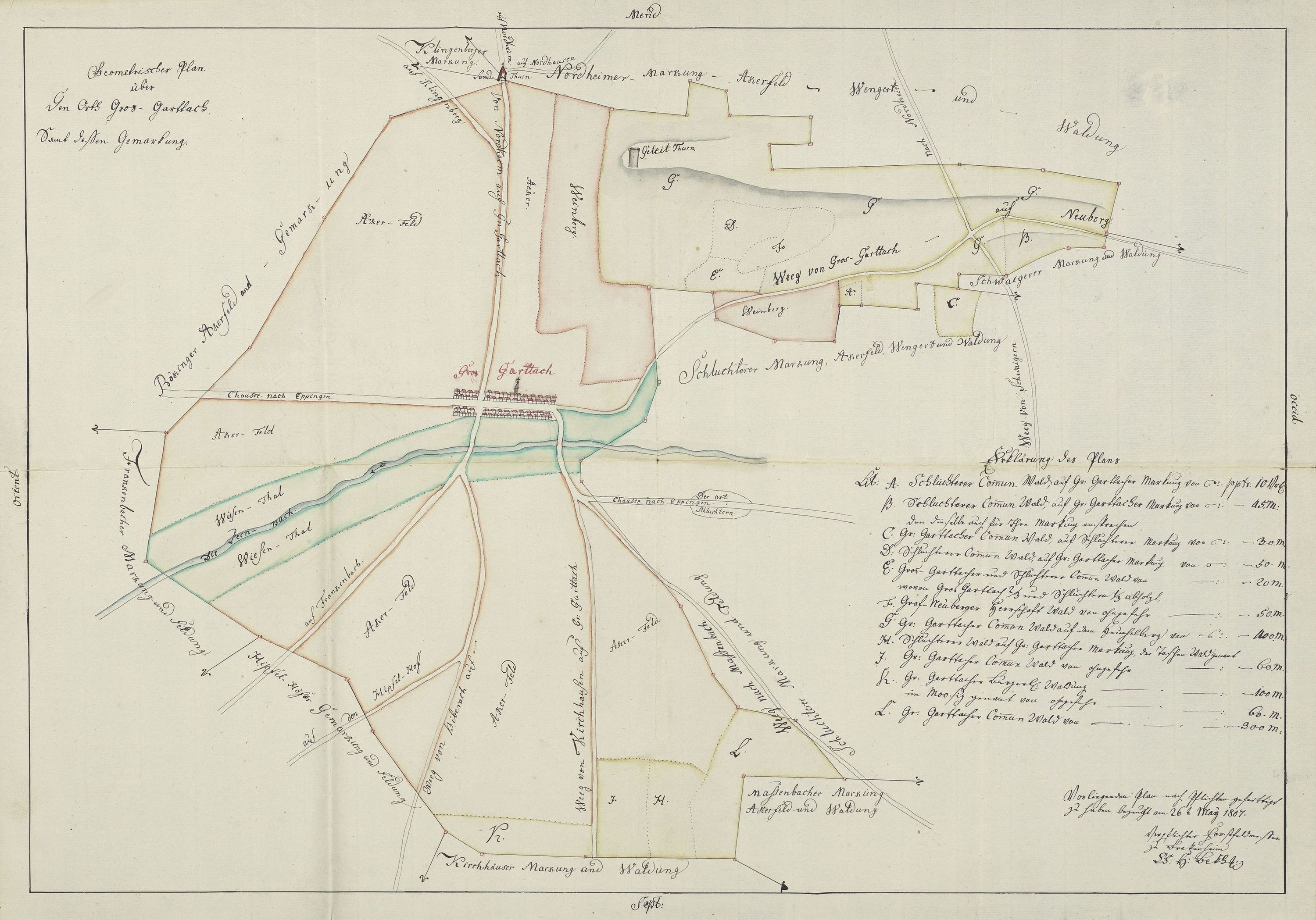 Gheometrischer Plan über den Orth Gros-Garttach samt dessen Gemarkung